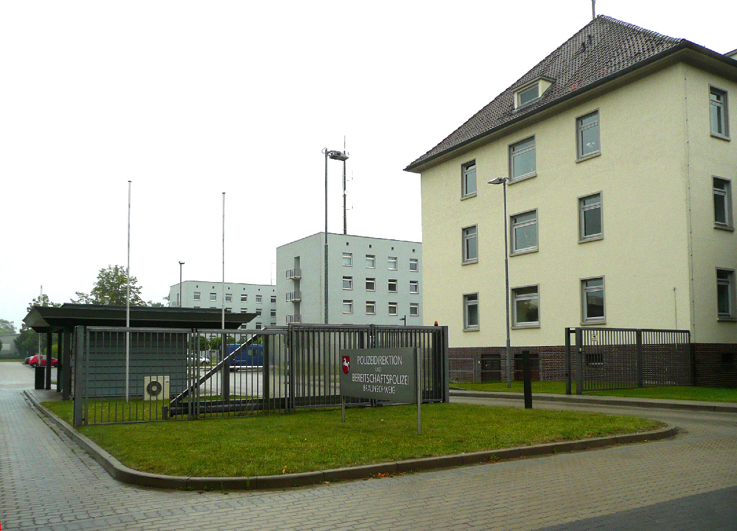 Polizeidirektion Braunschweig, Dienstgebäude Friedrich-Voigtländerstrasse